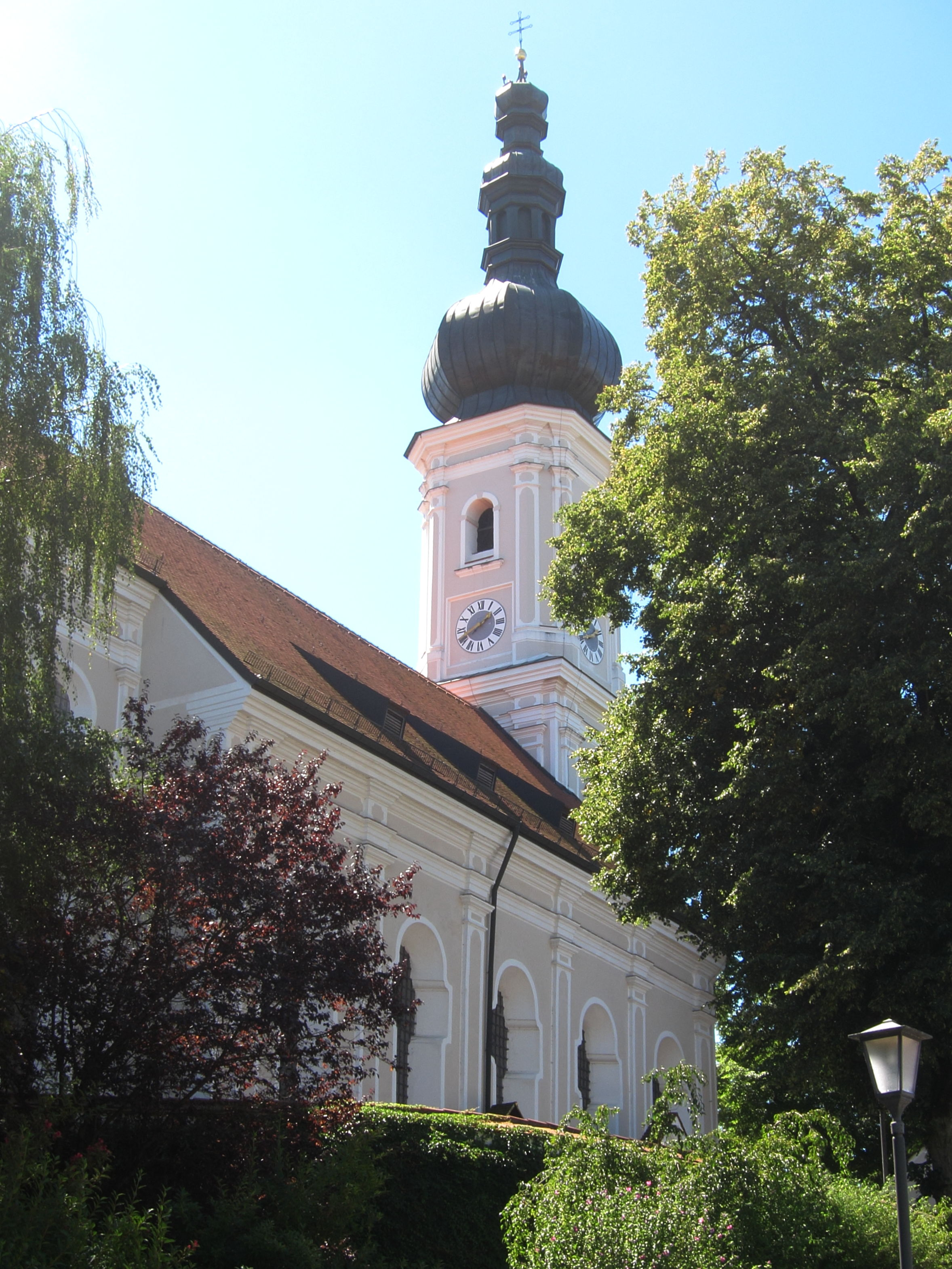 St. Johannes der Täufer; katholische Pfarrkirche, Saalbau mit eingezogenem halbrundem Chor und Spindelhelmturm, bedeutender barocker Bau von Anton Kogler, 1725-30, vollendet von Johann Baptist Lethner; mit Ausstattung.